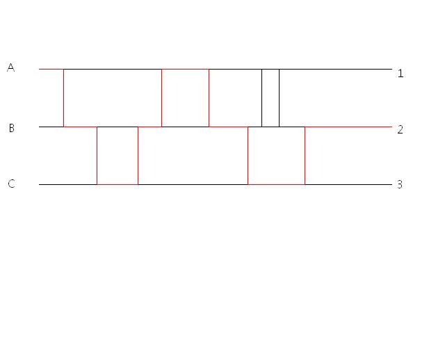 劃鬼腳